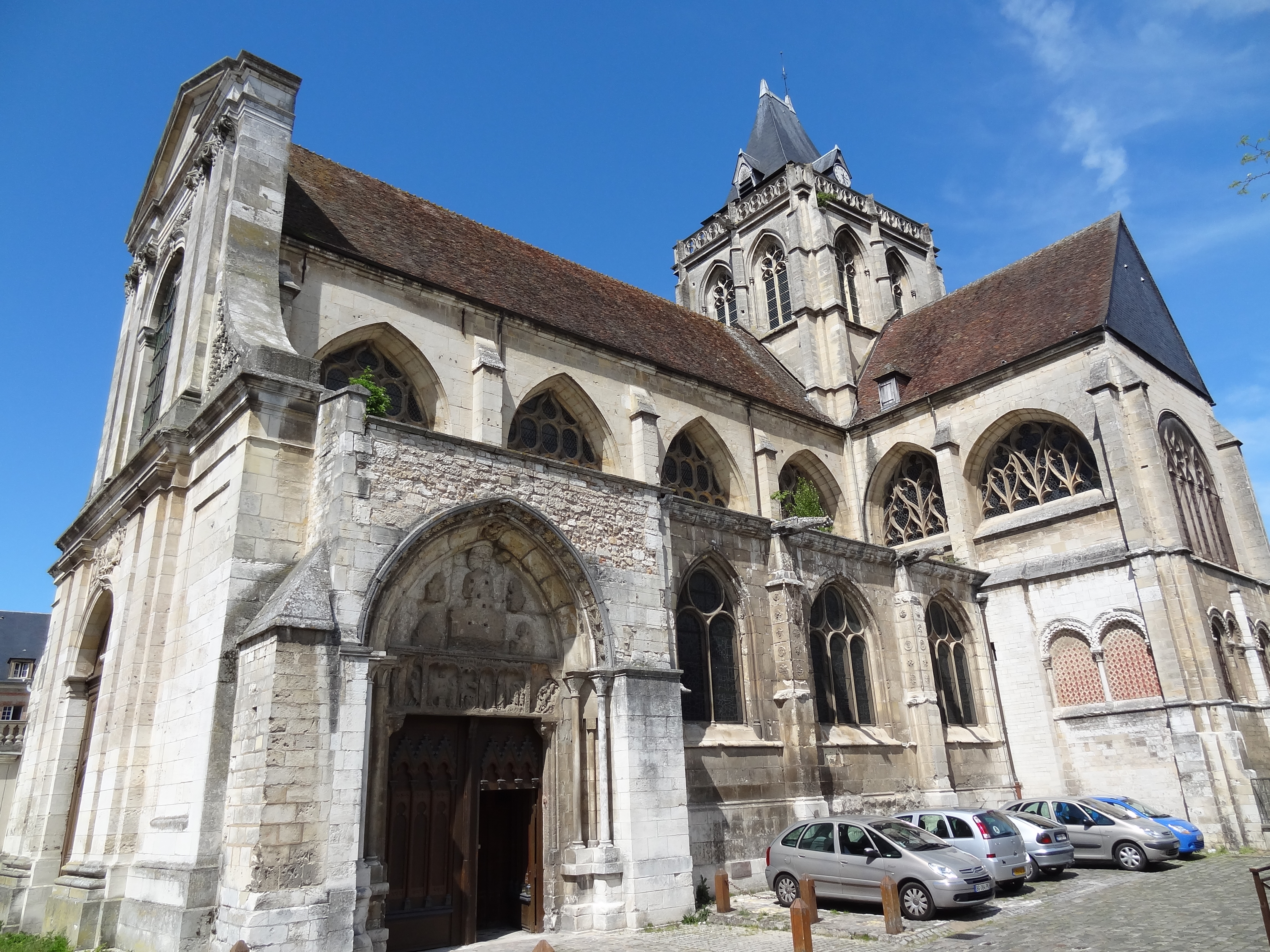 Église Saint-Taurin d'Évreux, vue depuis la place. This building is en partie classé, en partie inscrit au titre des Monuments Historiques. .